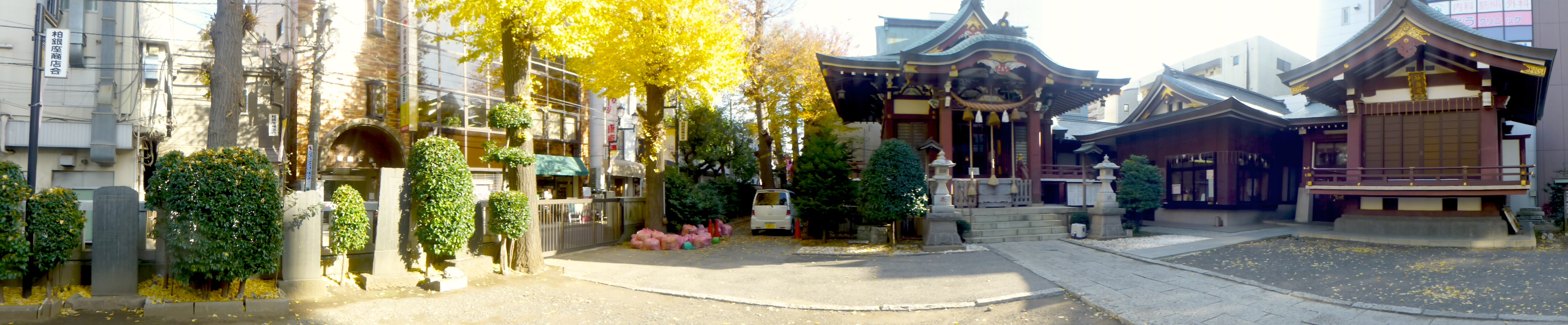 柏神社 (Kashiwa-Jinja, shinto shrine)